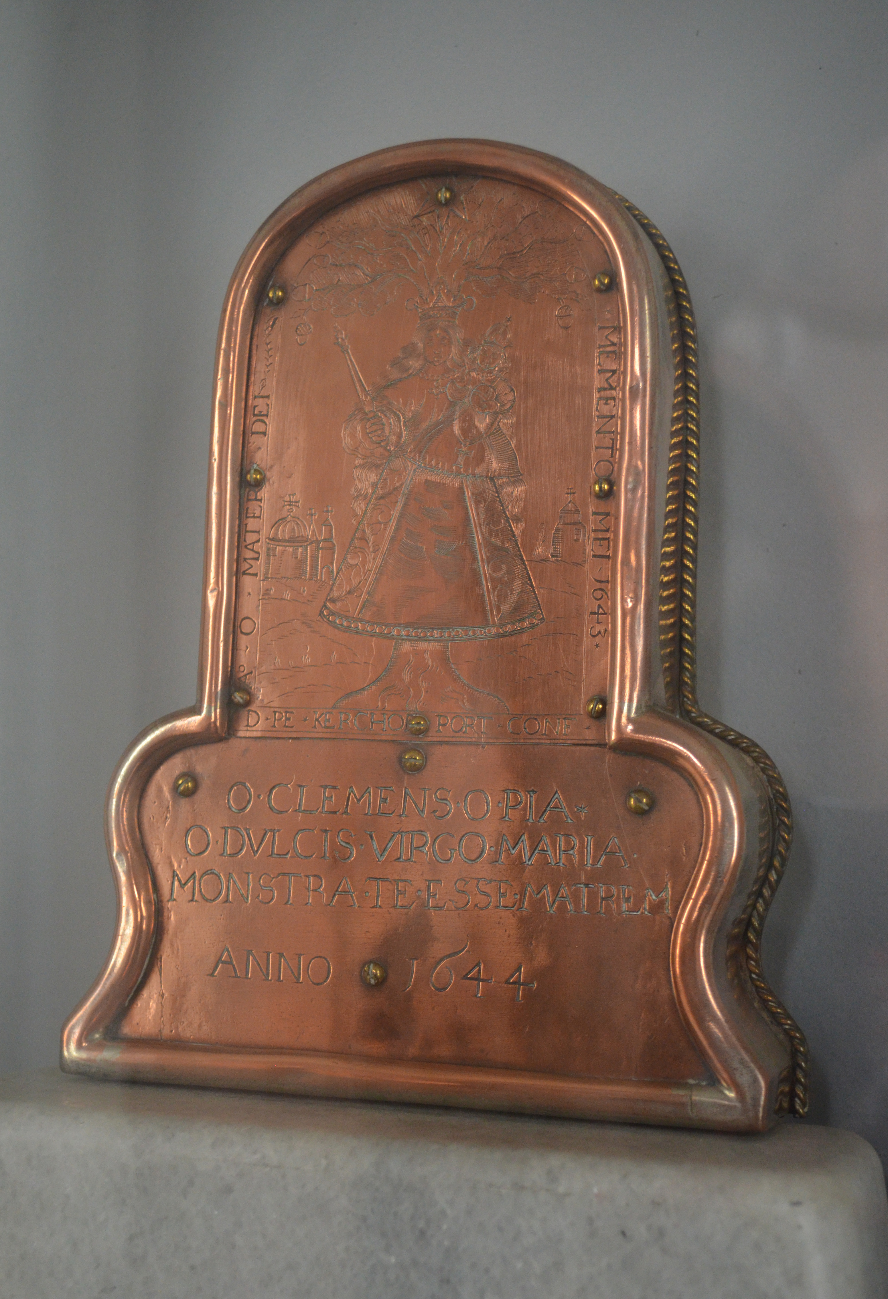 In Kupfer graviertes Gnadenbild in der Marienkapelle in Aachen-Burtscheid